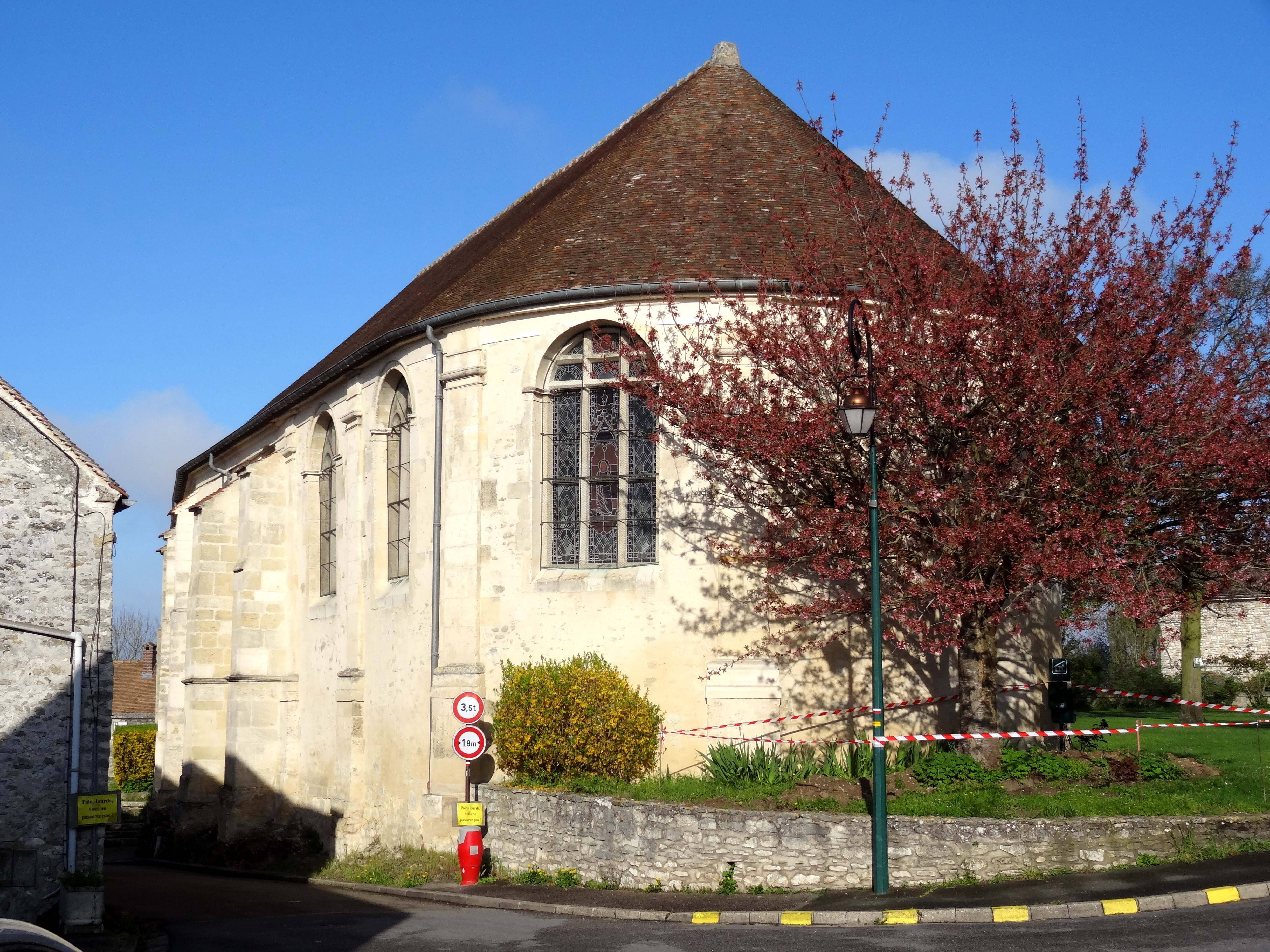 Église Saint-Martin de Follainville - voir titre.